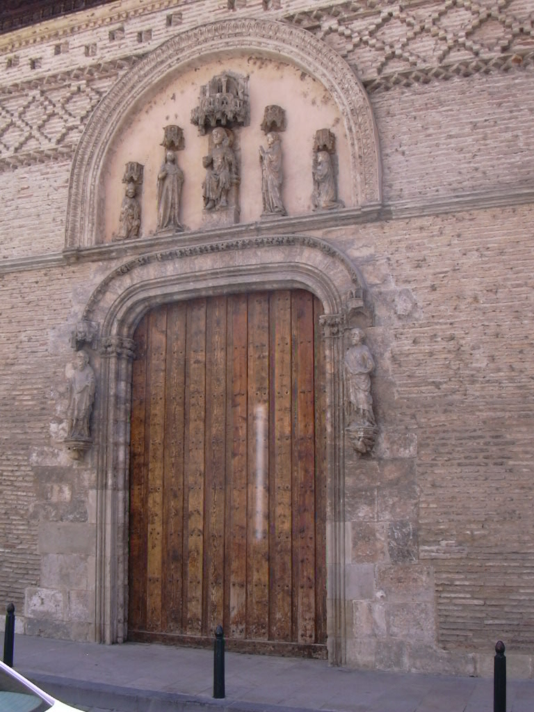 Zaragoza - San Pablo - Puerta mudéjar